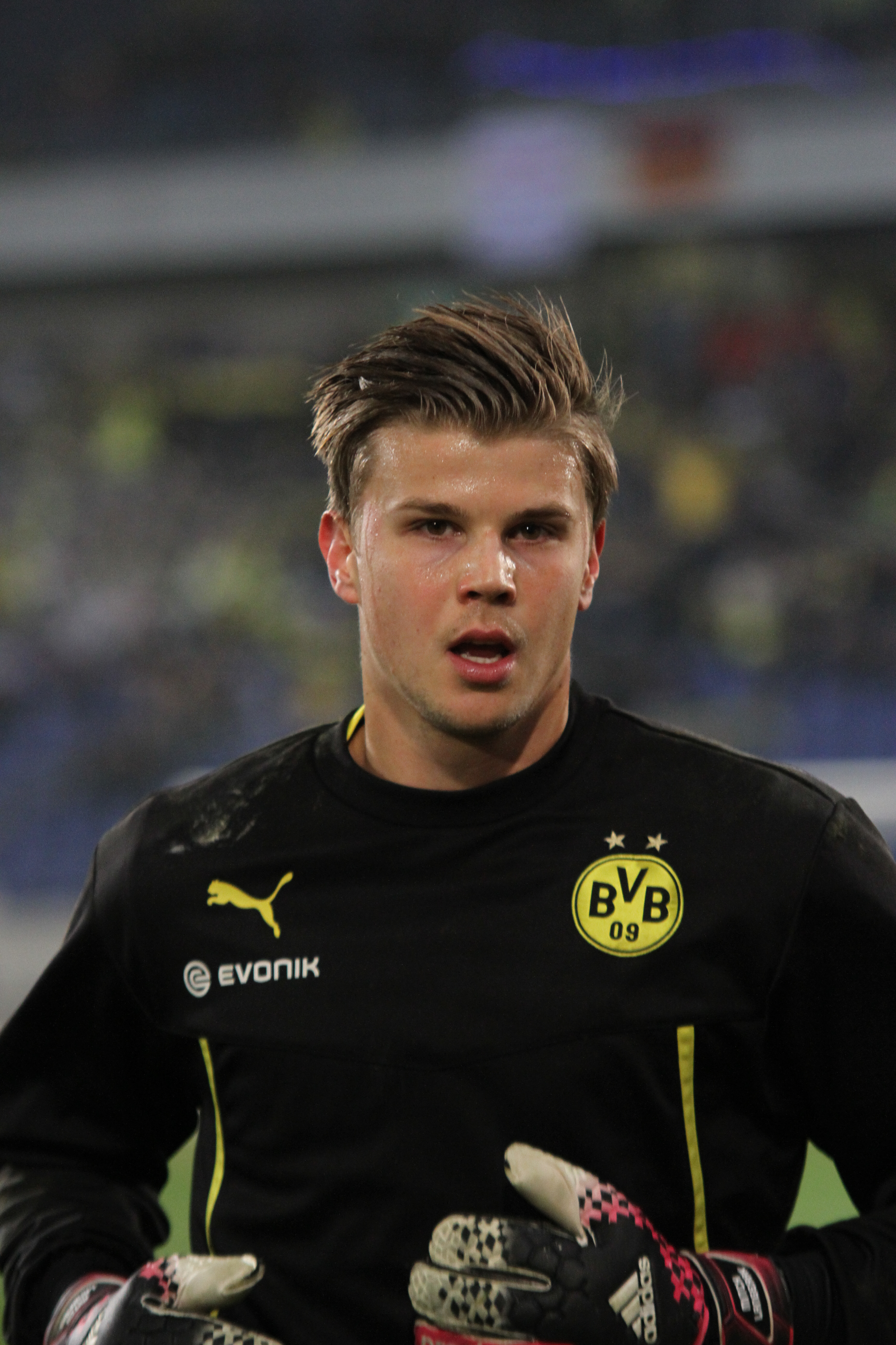 Mitchell Langerak (Borussia Dortmund)